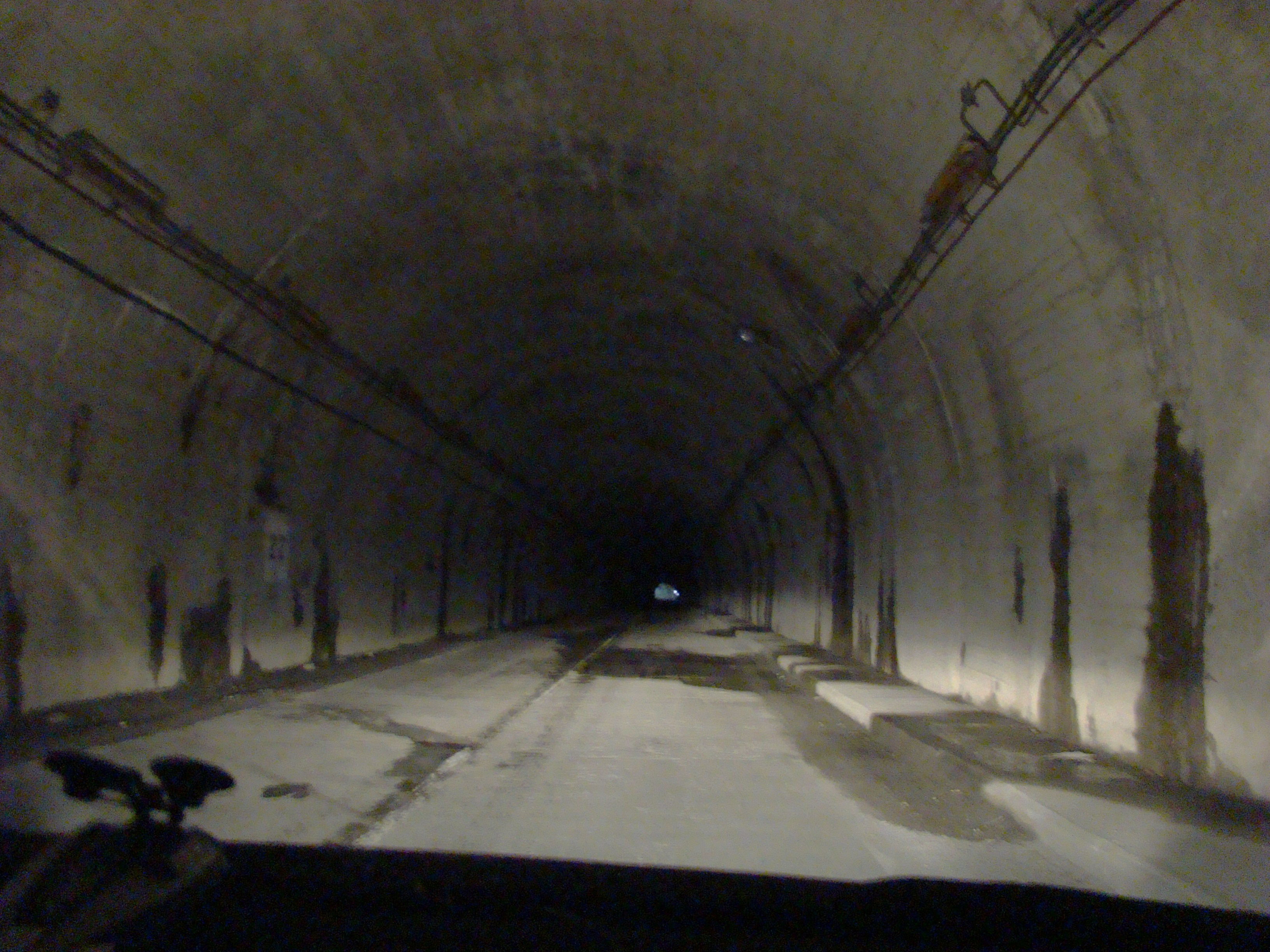 DN 7c